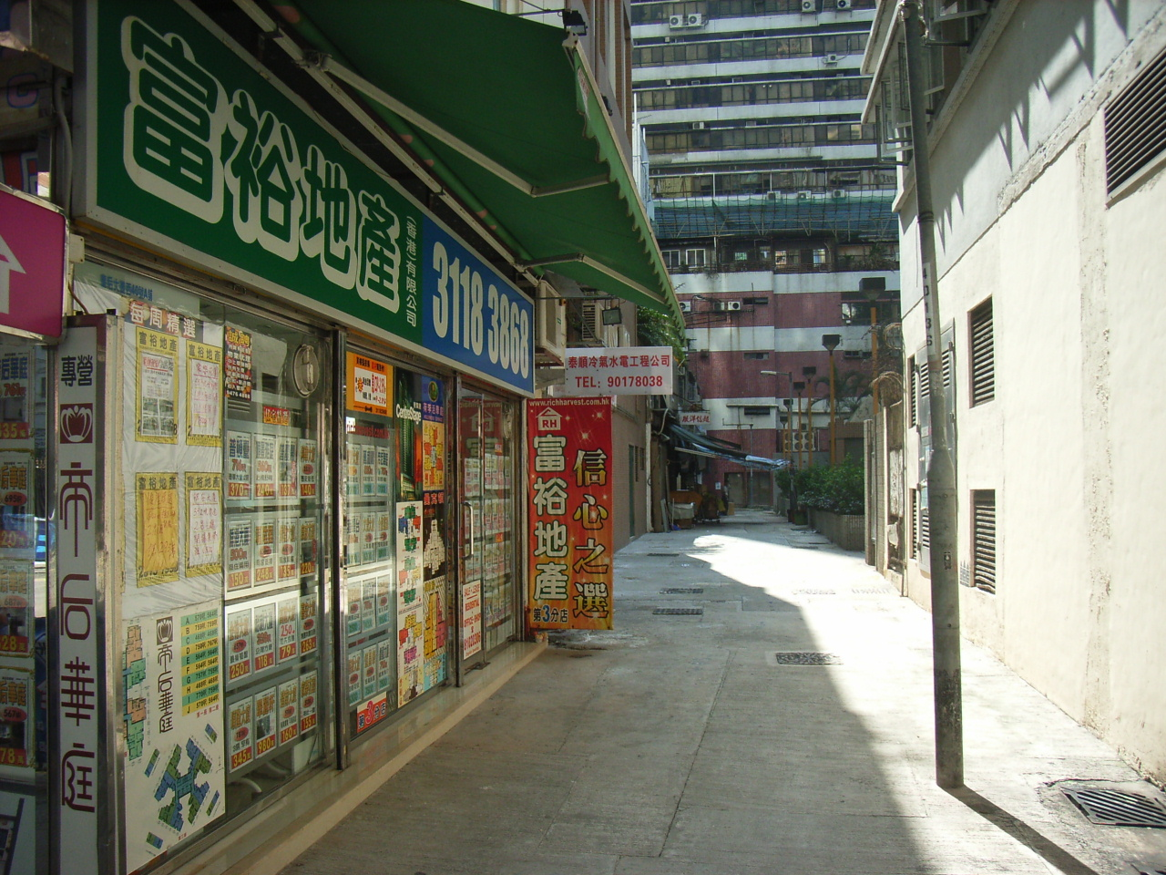 上環發興街 User:Sai Wan Dragon